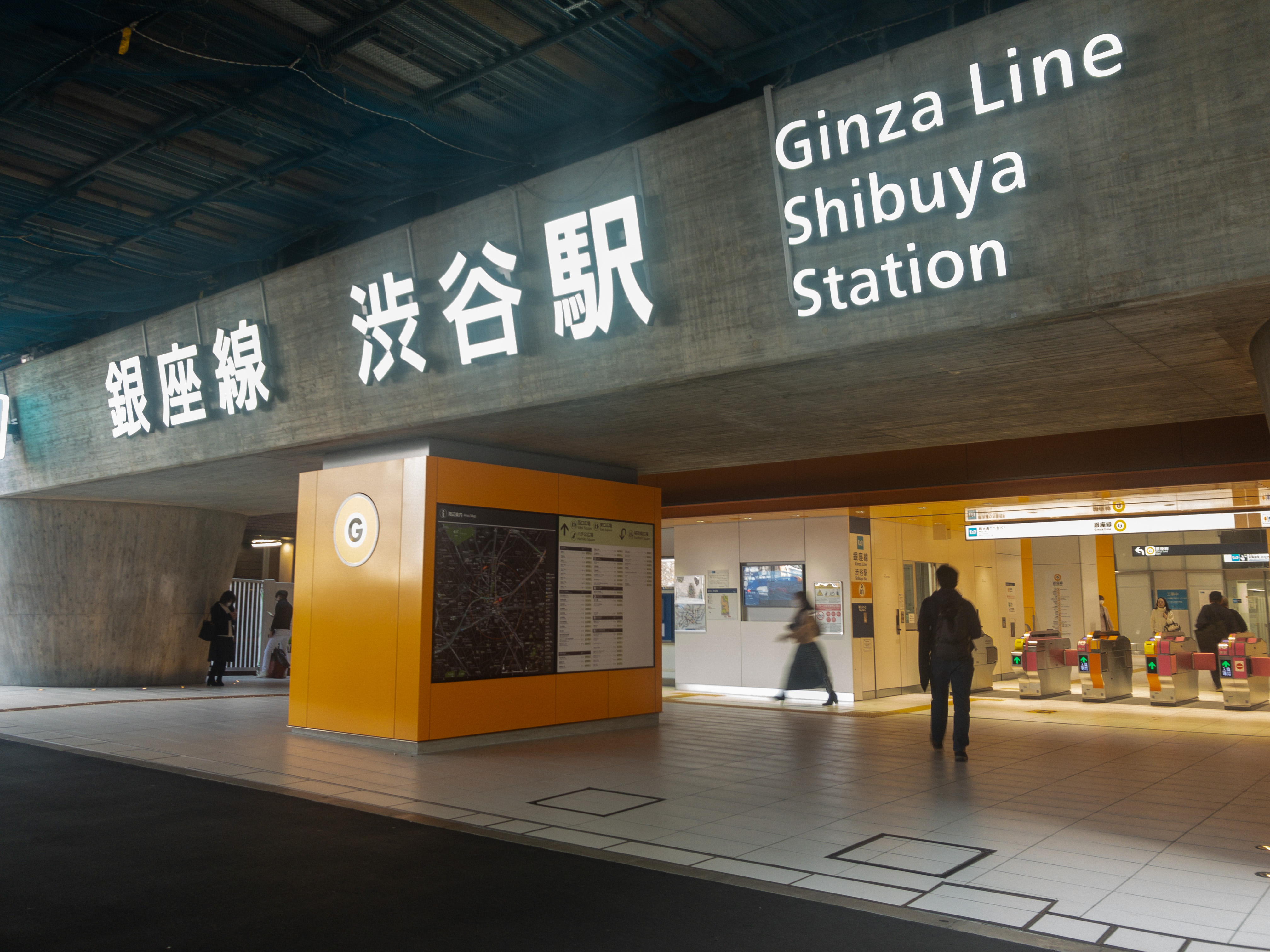 東京メトロ銀座線渋谷駅 明治通り口。2020年3月1日撮影。